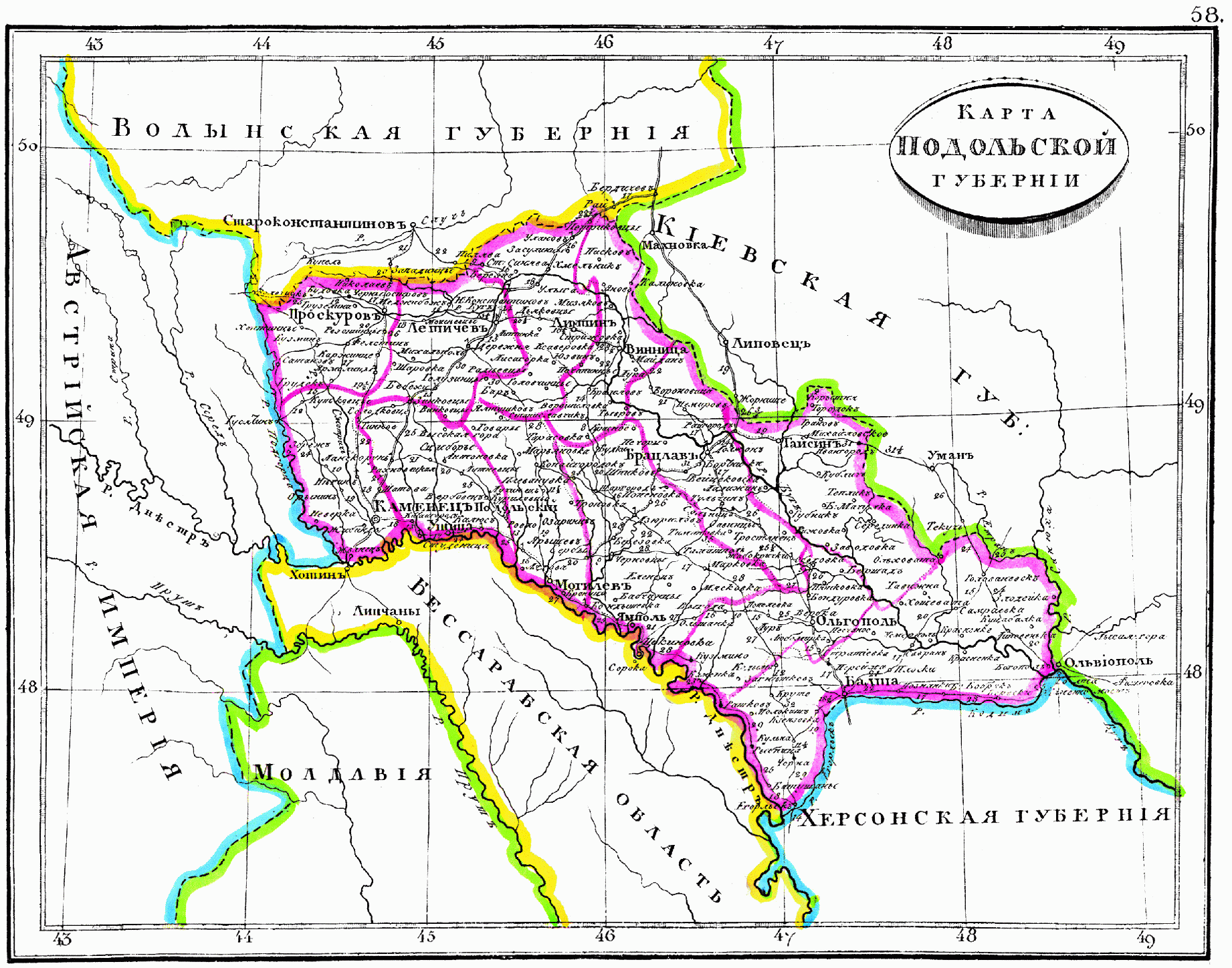 Карта Подольской губернии, 1835